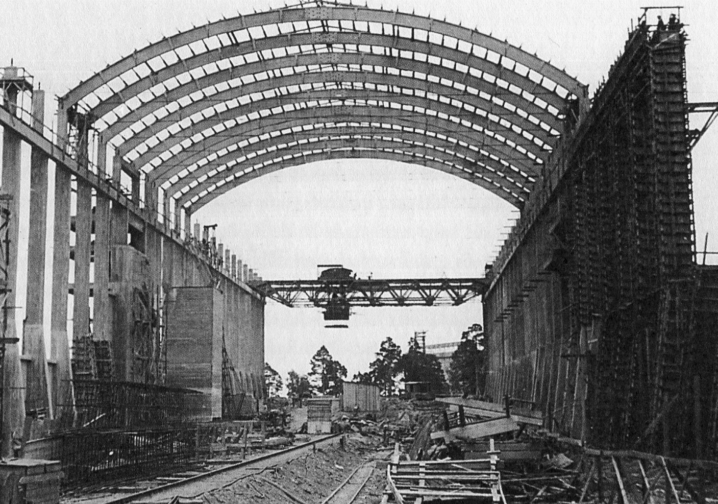 Stora Vika cementfabrik, fabrikens stora lagerhall under uppförande